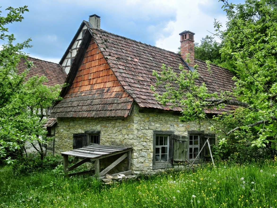 Deutschland - Baden-Württemberg - Landkreis Tuttlingen - Neuhausen ob Eck: Freilichtmuseum - Hafnerwerkstatt